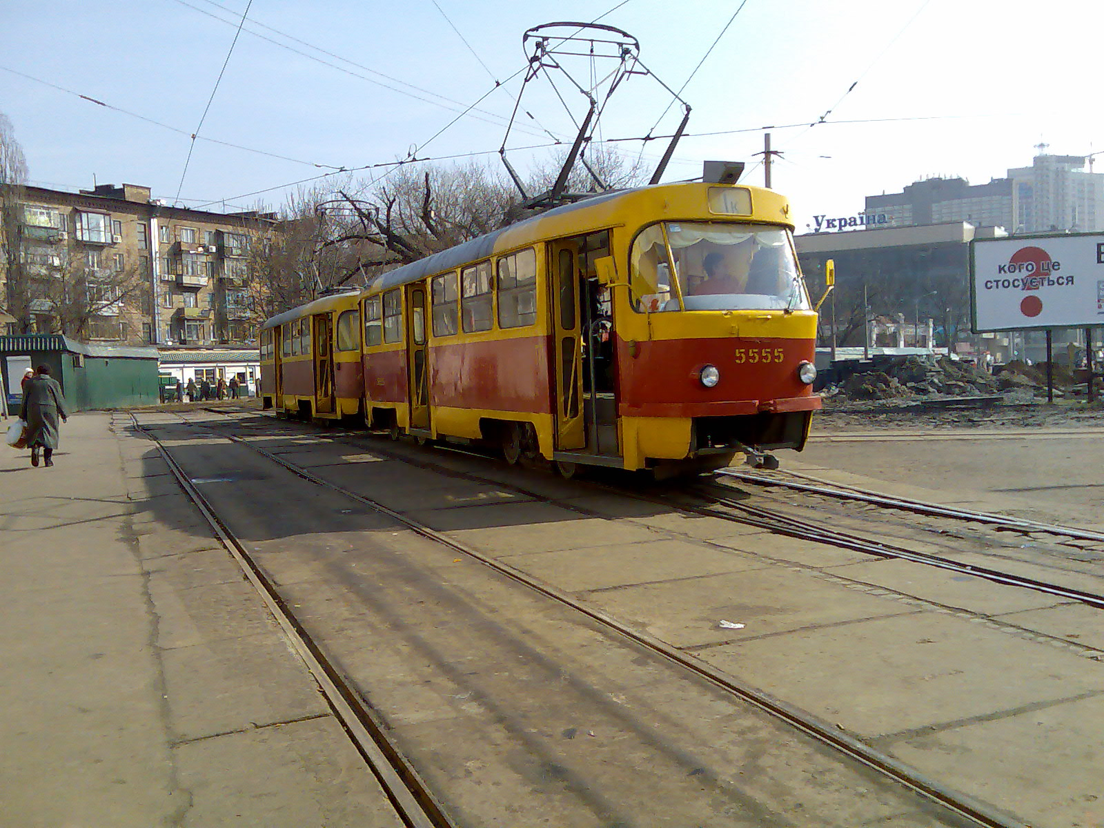 Трамвай маршрута 1-к (вагоны №№5555 и 5559) на конечной станции «Площадь Победы» (Киев)